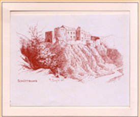 Schüttburg, Rötelzeechnong.